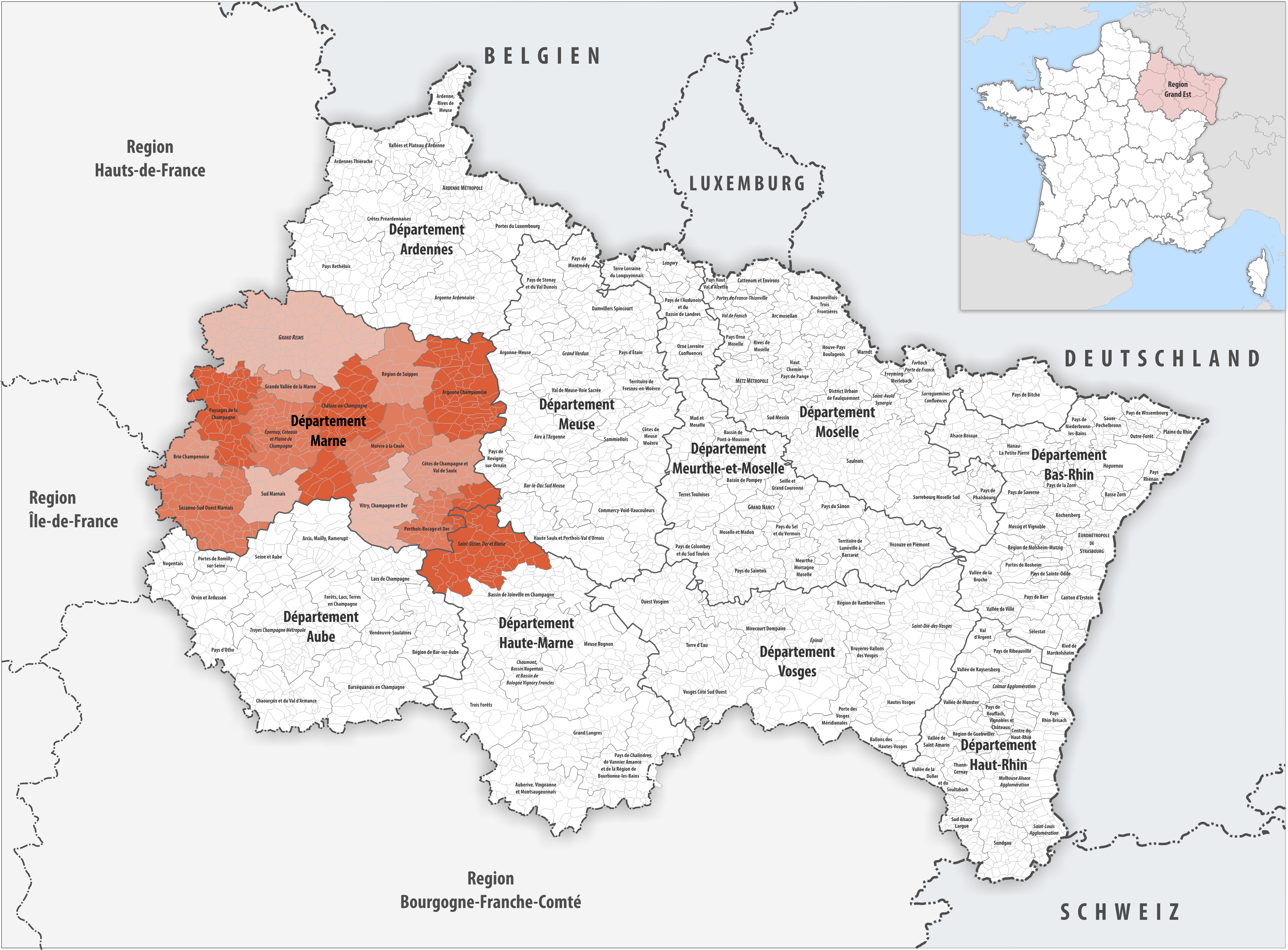 Gemeindeverbände im Département Marne